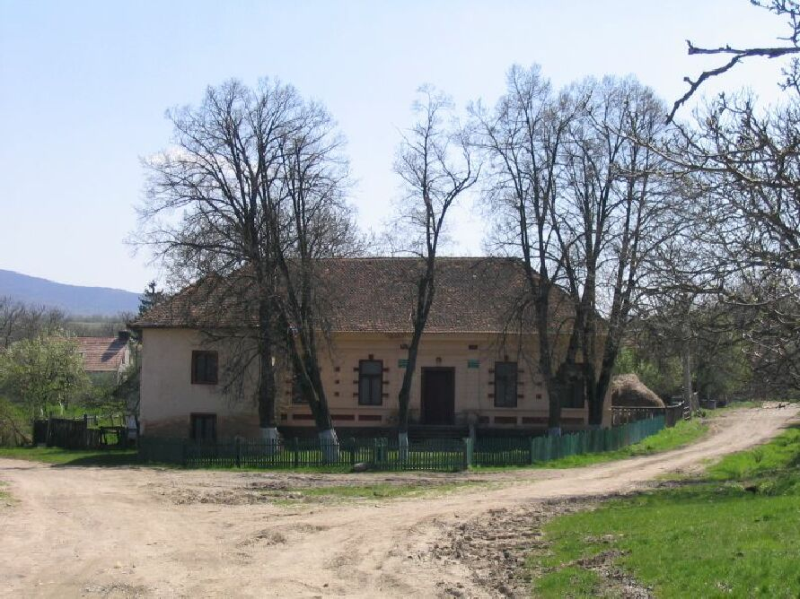 Sepsimagyarósi művelődési ház, 2006